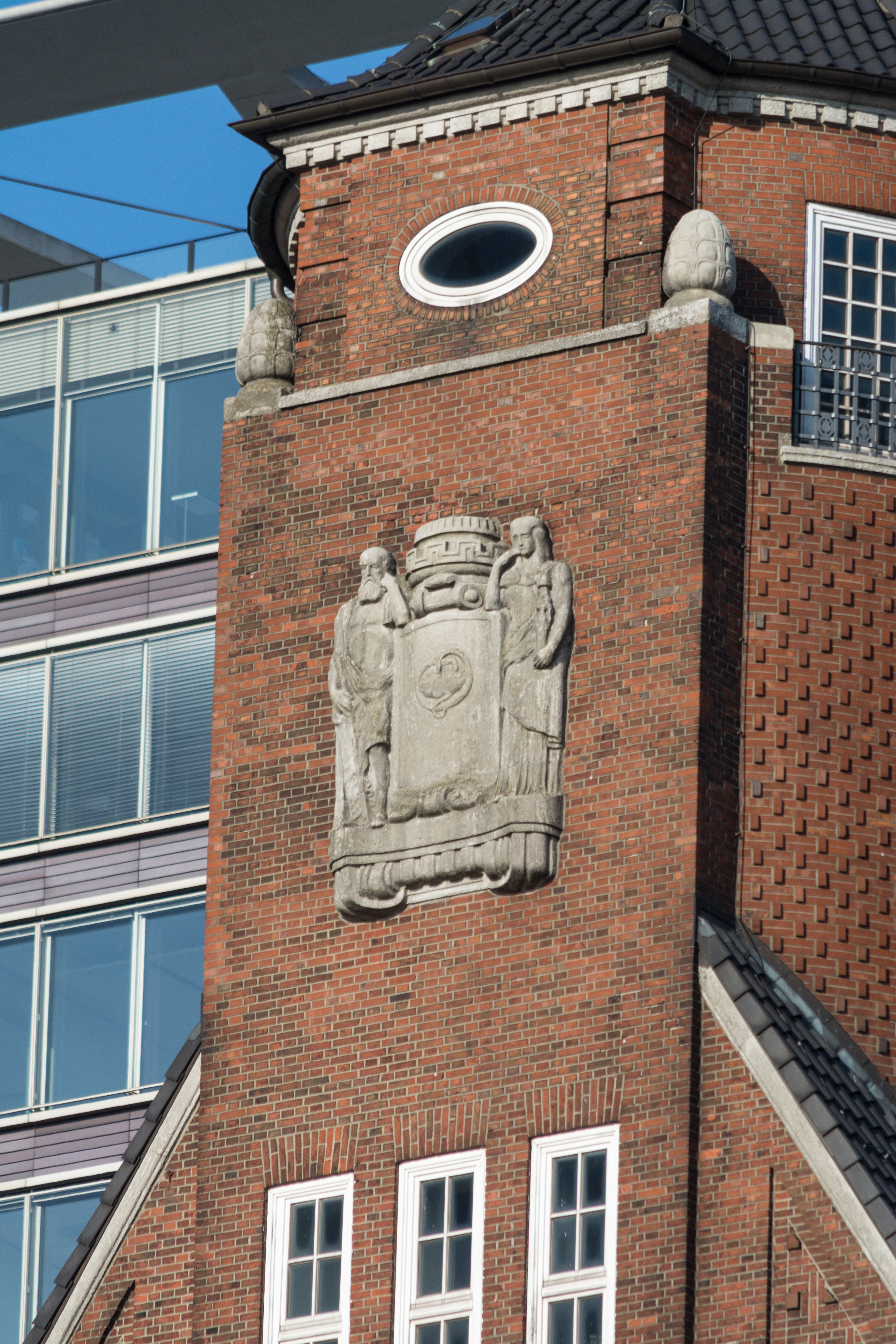 Altbau des Bernhard-Nocht-Instituts für Tropenmedizin in Hamburg-St. Pauli: Turm des Haupthauses mit Werksteinwappen von Johann Michael Bossard, im Hintergrund der Astra-Turm. This is a photograph of an architectural monument.